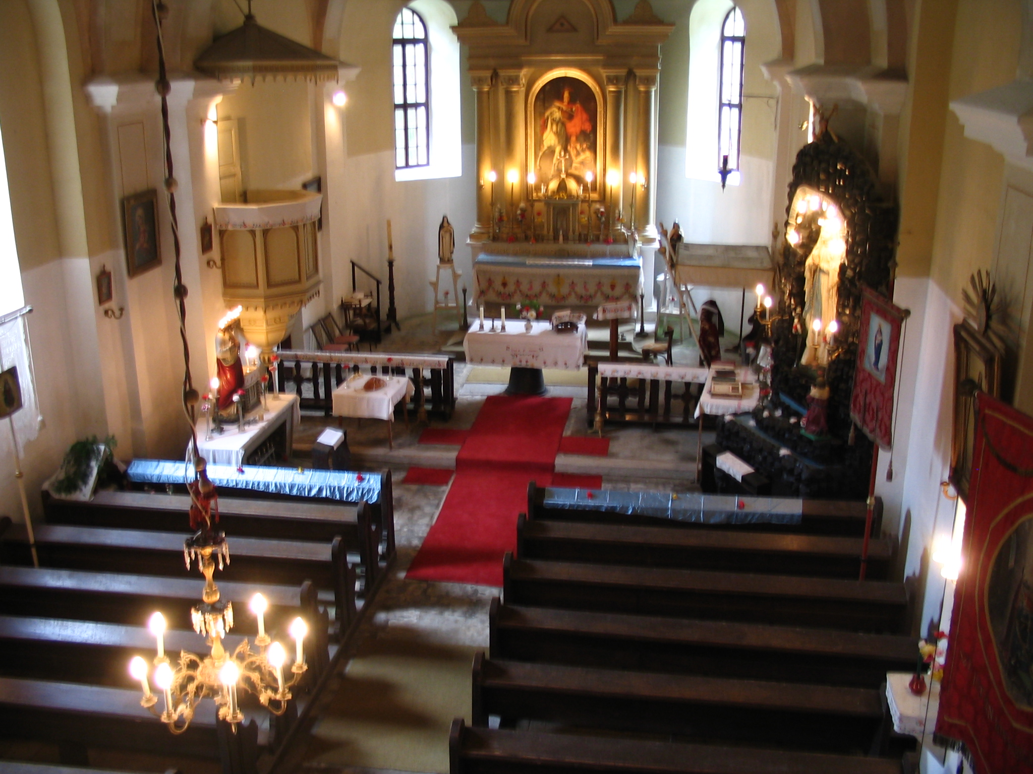 Római katolikus templom (Kisszőlős, Veszprém megye)